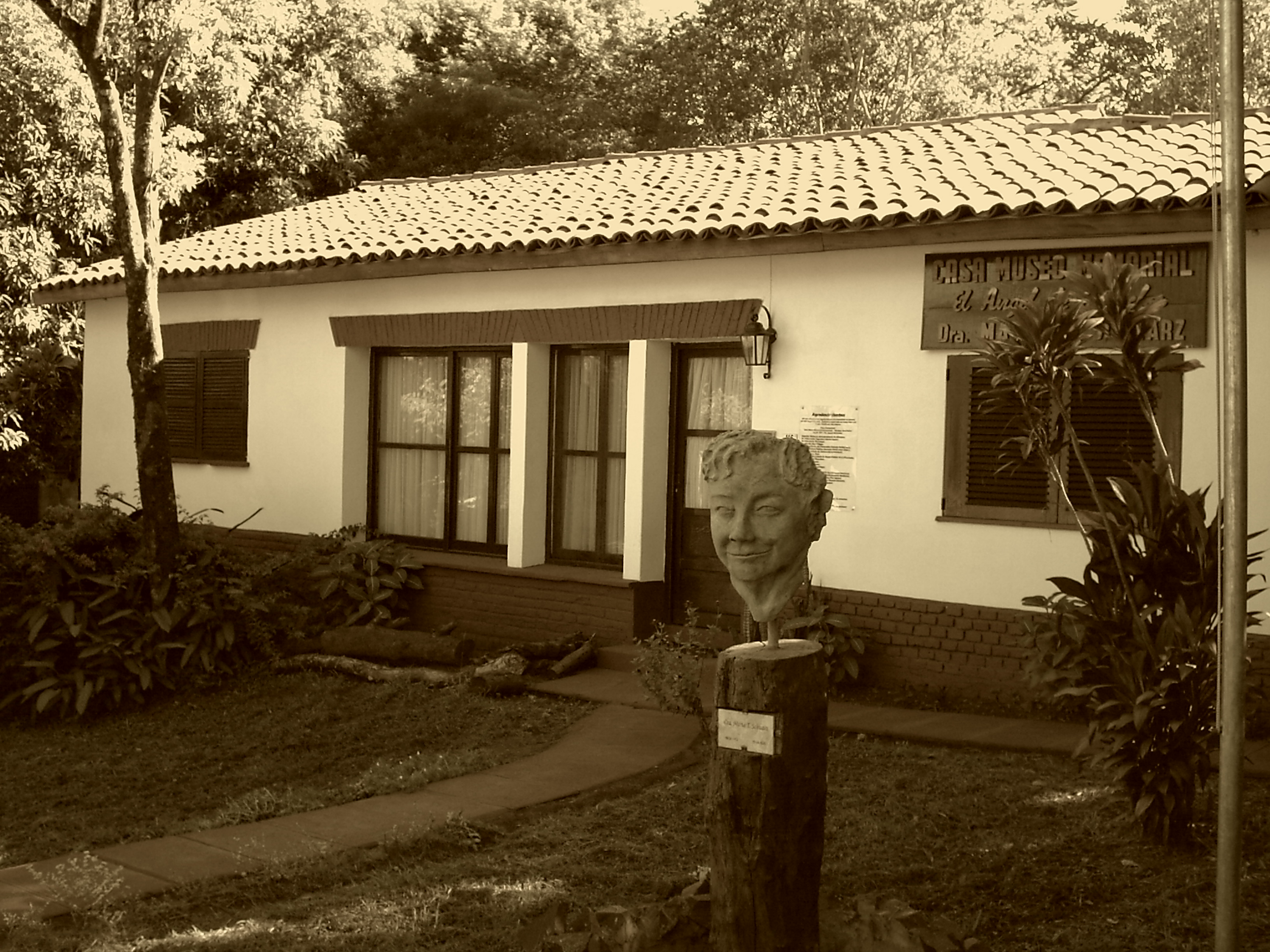 Casa Museo "El ángel de la selva". Sede de la Fundación Schwarz. Frente al Hospital Dra. Marta Teodora Schwarz.